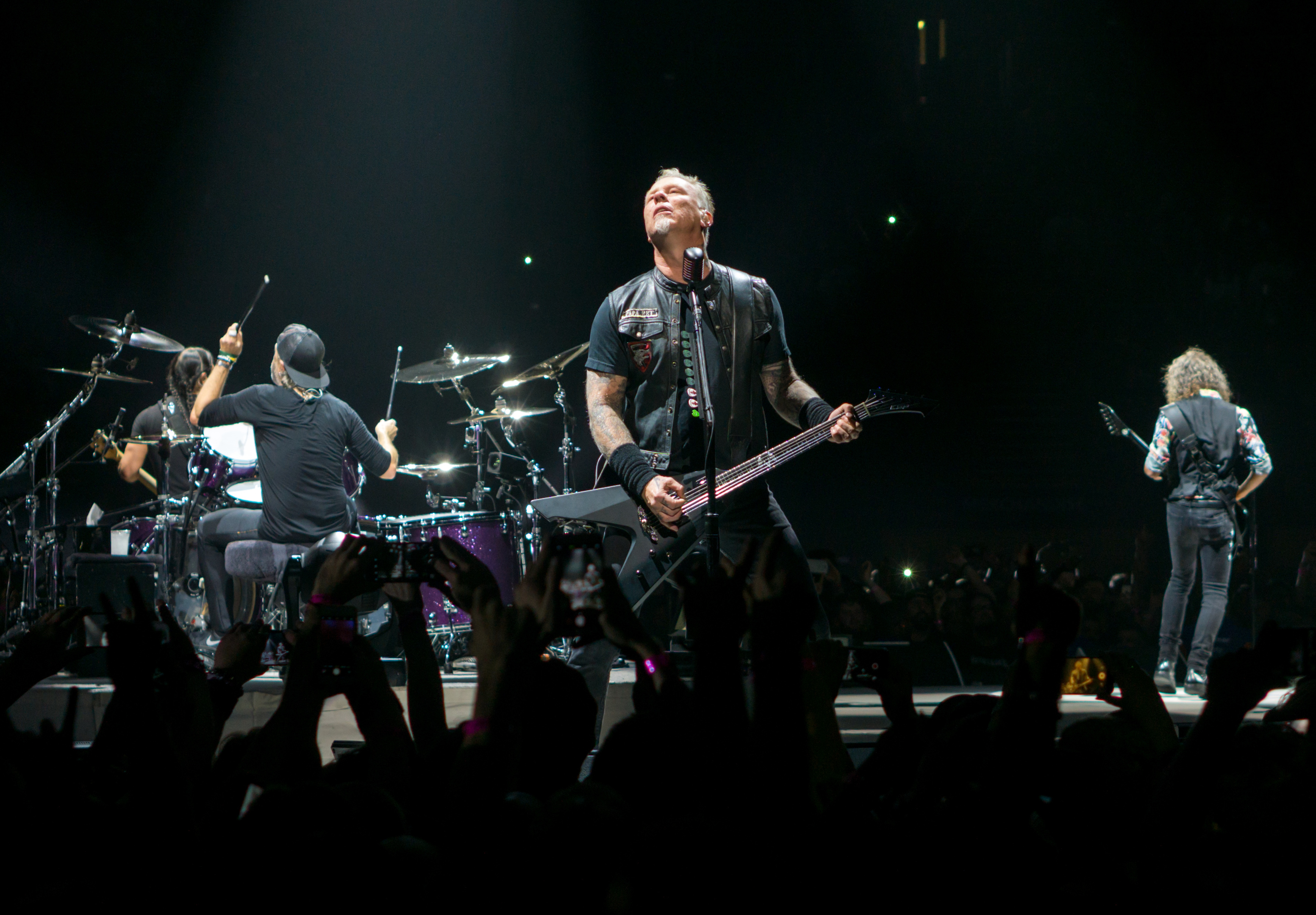 MetallicaO2241017-3